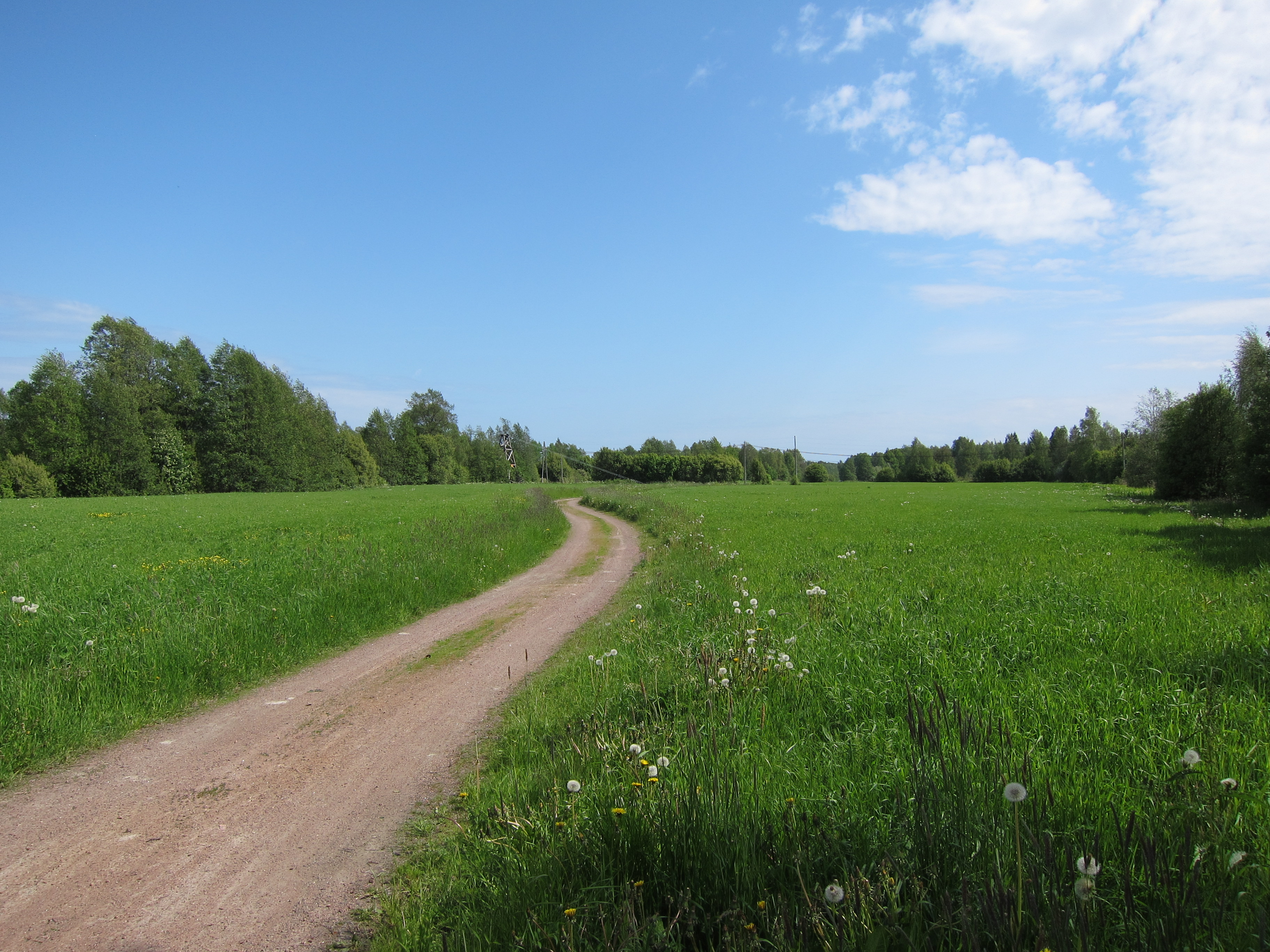 Pernoon Mikkolansaarta Kymijoessa Kotkassa. Saaresta kulkee riippusilta joen päähaaran ylitse Laajakosken kylään joen itäpuolelle.